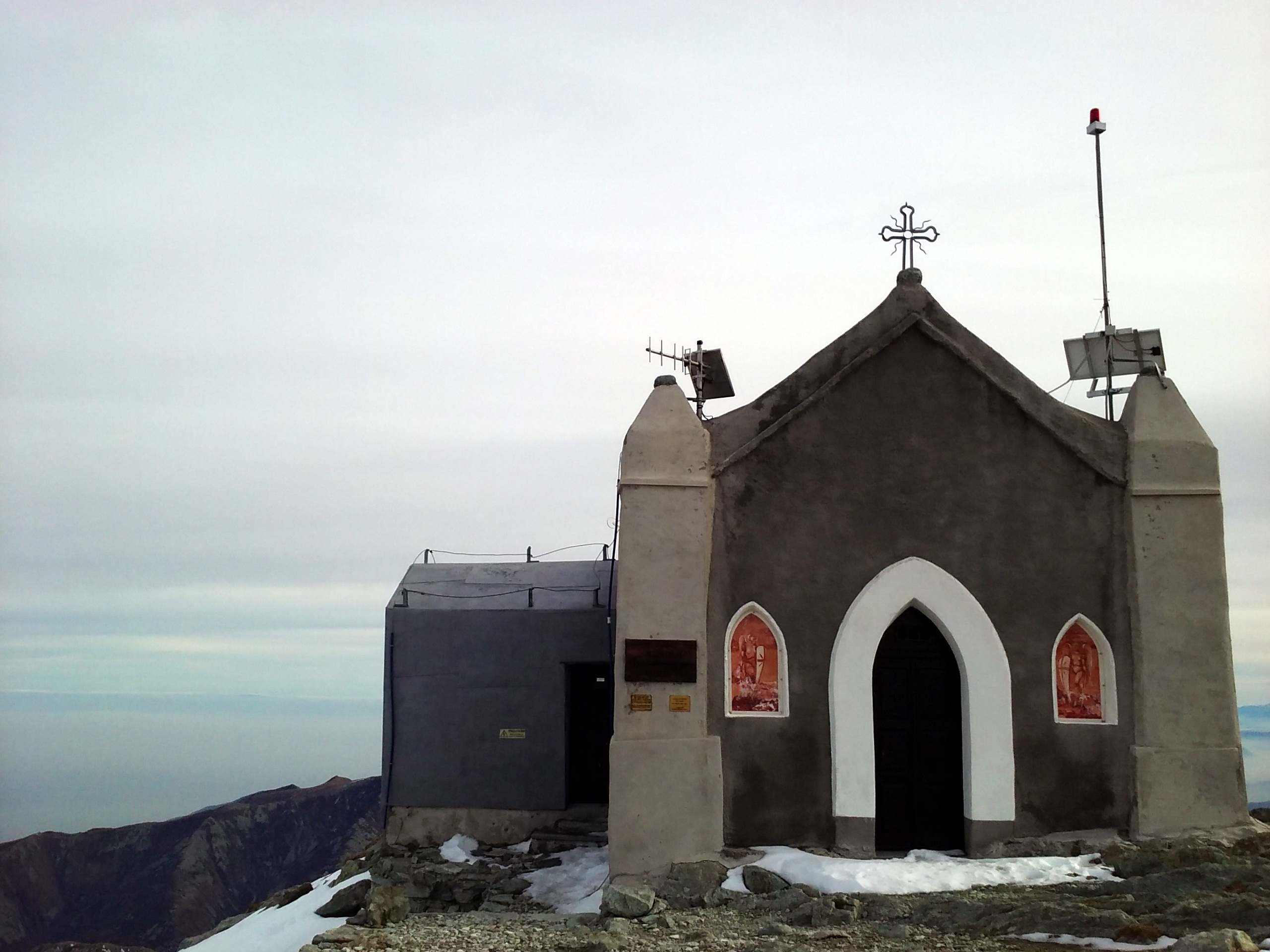 Fotografia della Cappella della Madonna degli Angeli e del Bivacco adiacente del Monte Robinet, Piemonte, Italia, scattata il 25 Ottobre 2015 da me medesimo.